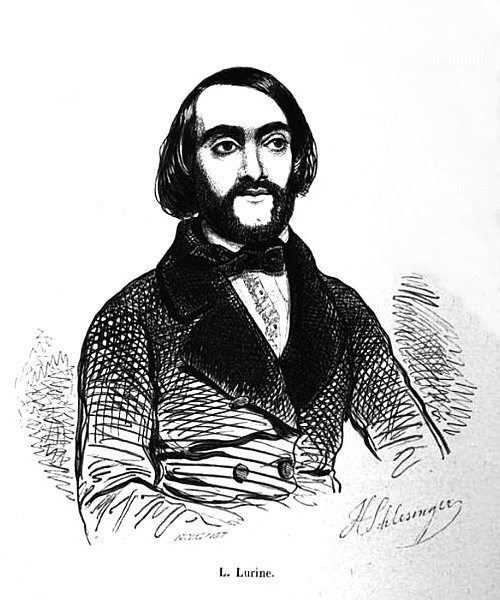 portrait du littérateur Louis Lurine